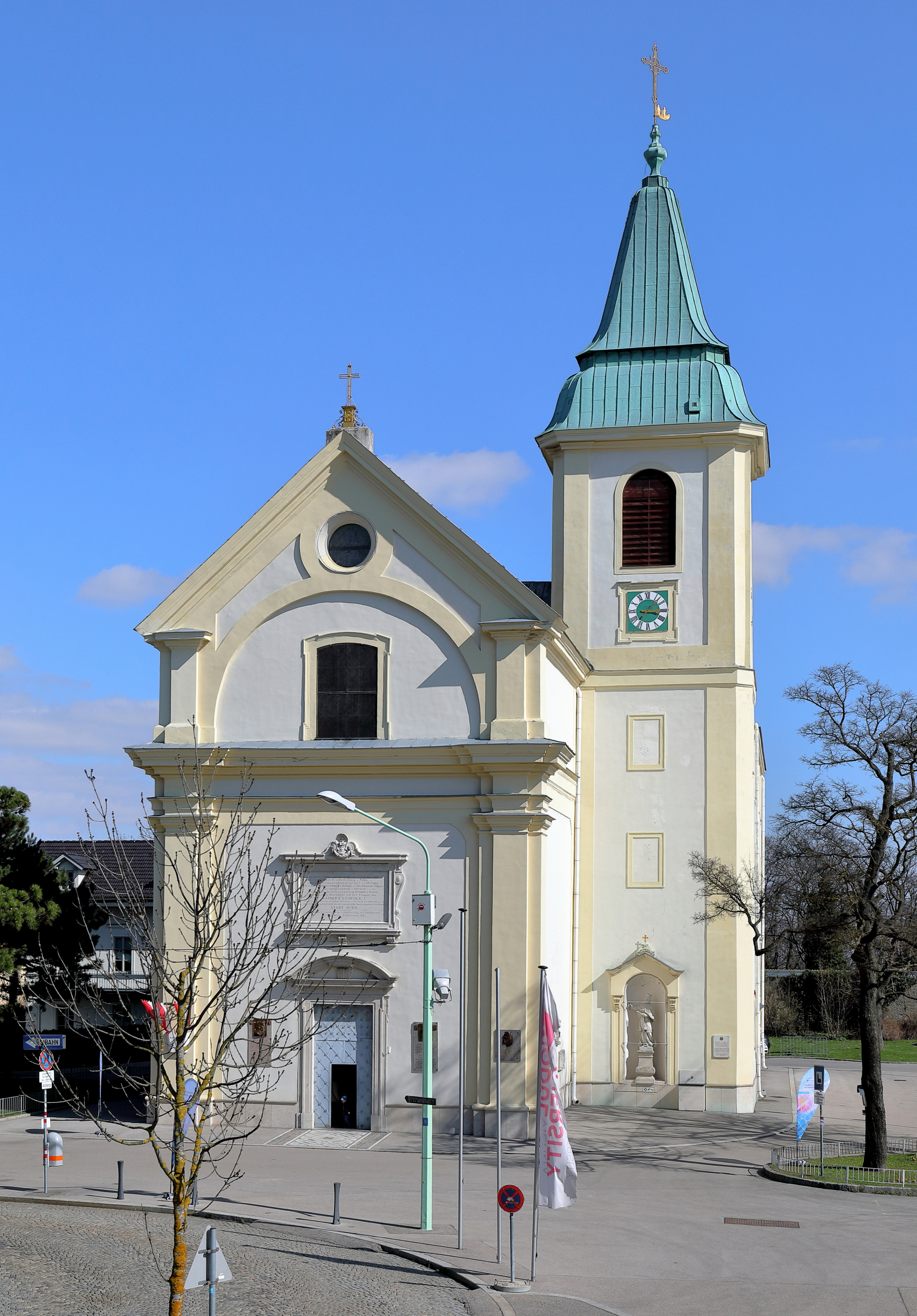 Westansicht der Kahlenbergkirche hl. Josef bzw. Josefskirche am Kahlenberg im 19. Wiener Gemeindebezirk Döbling.Der Sakralbau wurde ab 1629 im Zuge der Kamaldulenser-Klostergründung als Klosterkirche errichtet. Er verfiel mehrfach und wurde mehrfach wieder instandgesetzt sowie geweiht. Im Jahr 1906 kam die Kirche in den Besitz der polnischen Ordensgemeinschaft der „Kongregation der Auferstehung des Herrn“, die diese innen und außen mit hohem Kostenaufwand renovierte und seitdem betreut.